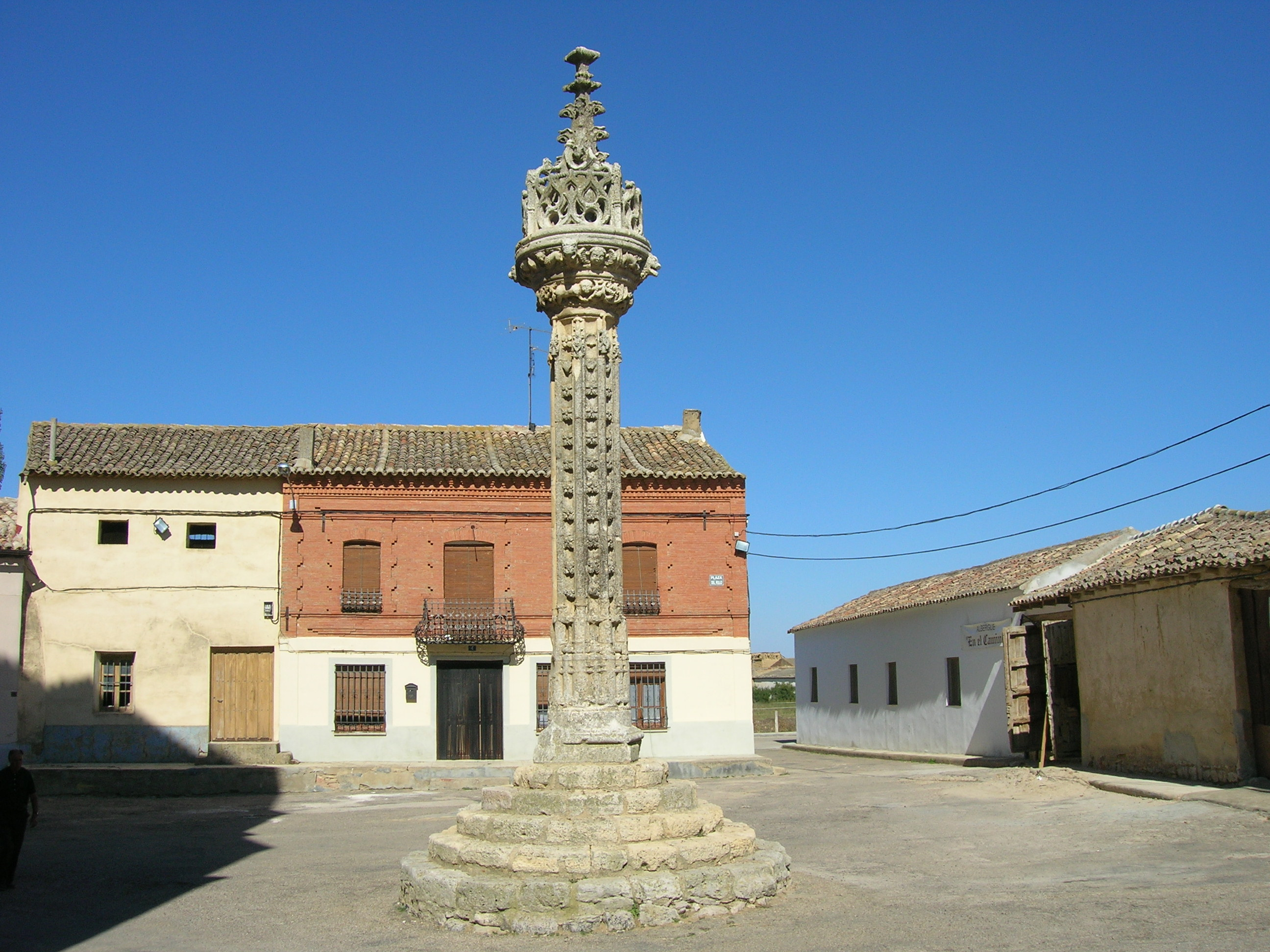 Rollo de Justicia en la plaza del pueblo. El rollo simbolizaba el poder jurídico en la comarca y en él eran encadenados los reos antes de ser juzgados por el corregidor.